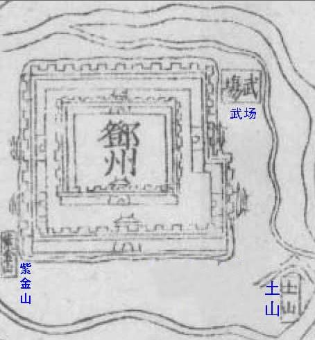 dengzhou in 1700